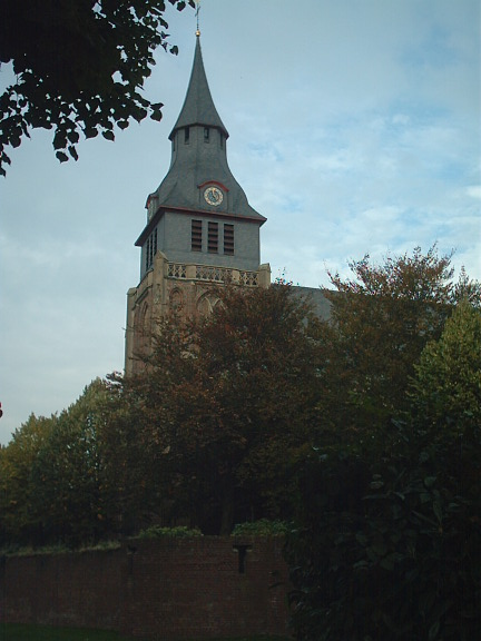 Pfarrkirche St. Peter und Paul Kranenburg